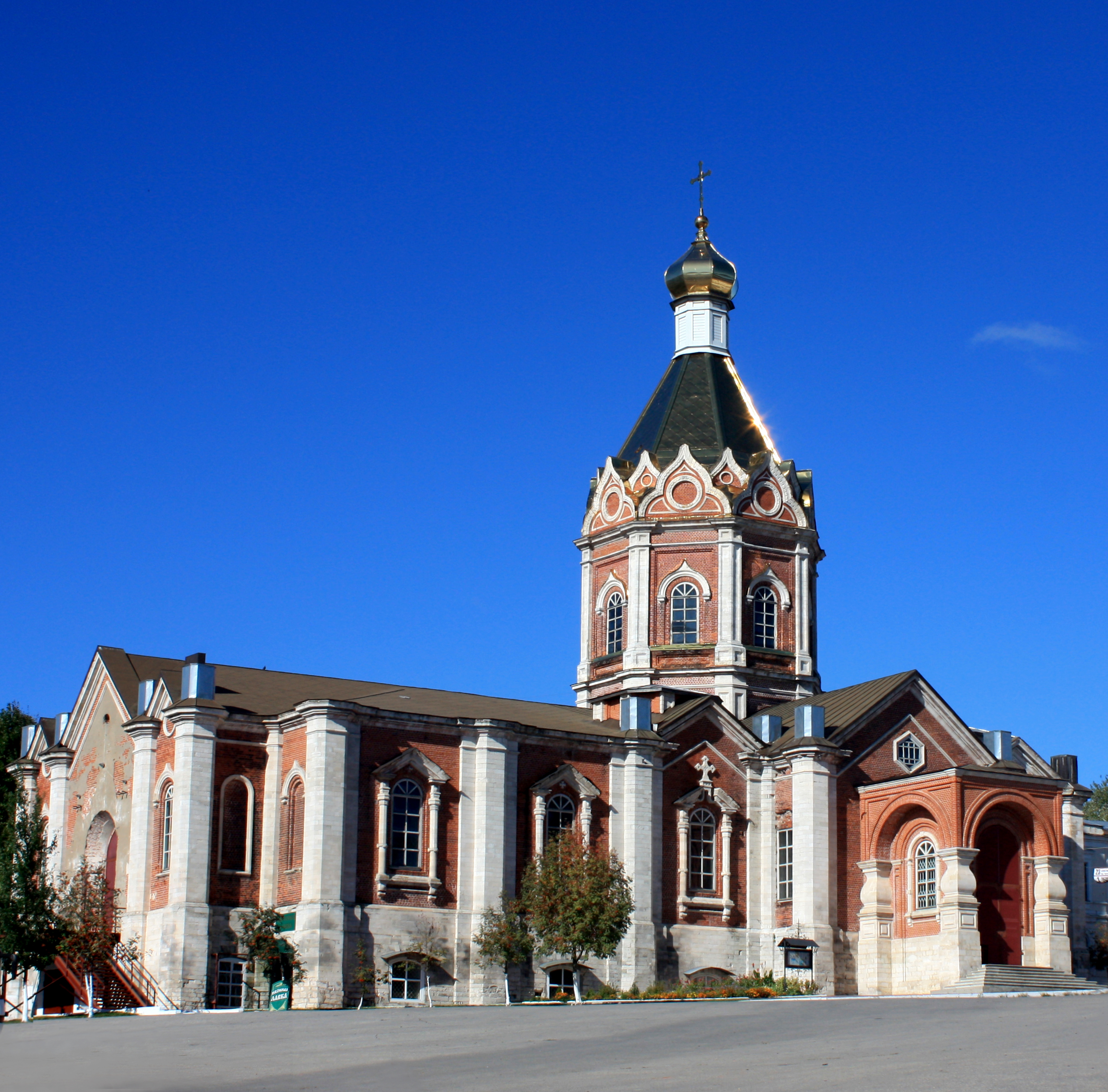 Вознесенский собор: площадь Советская, 1, Касимов, Рязанская область